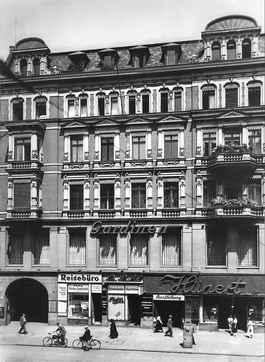 Kamienica Pod Złotą Kotwicą , nr 52 na wrocławskim Rynku. (lata (1936-1937)